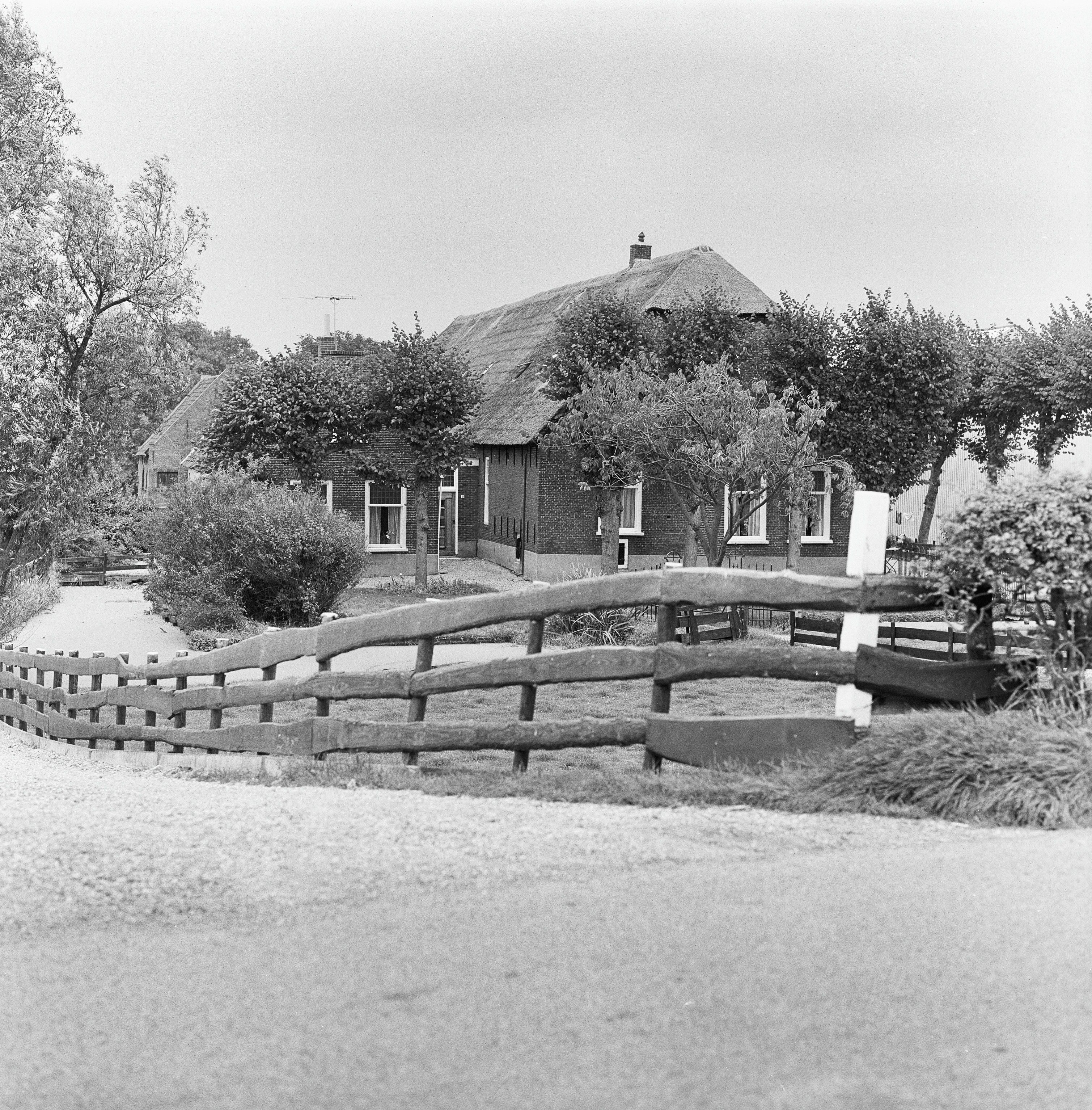 overzicht vanaf de dijk